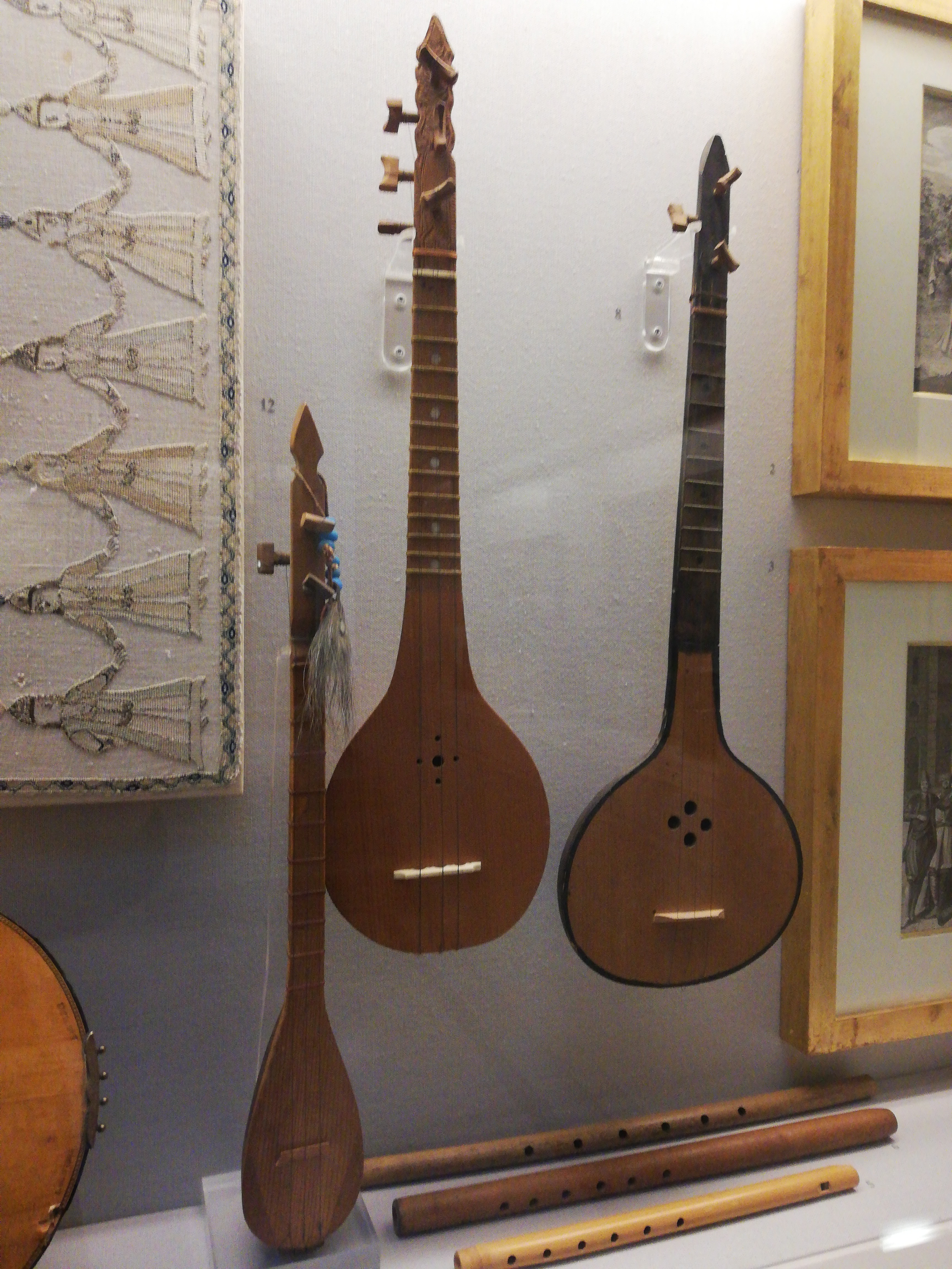 Au centre, trois baglamas (instruments grec à cordes pincées), couvrant des registres sonores différents (du plus aigu pour le plus petit, au plus grave pour le plus gros)